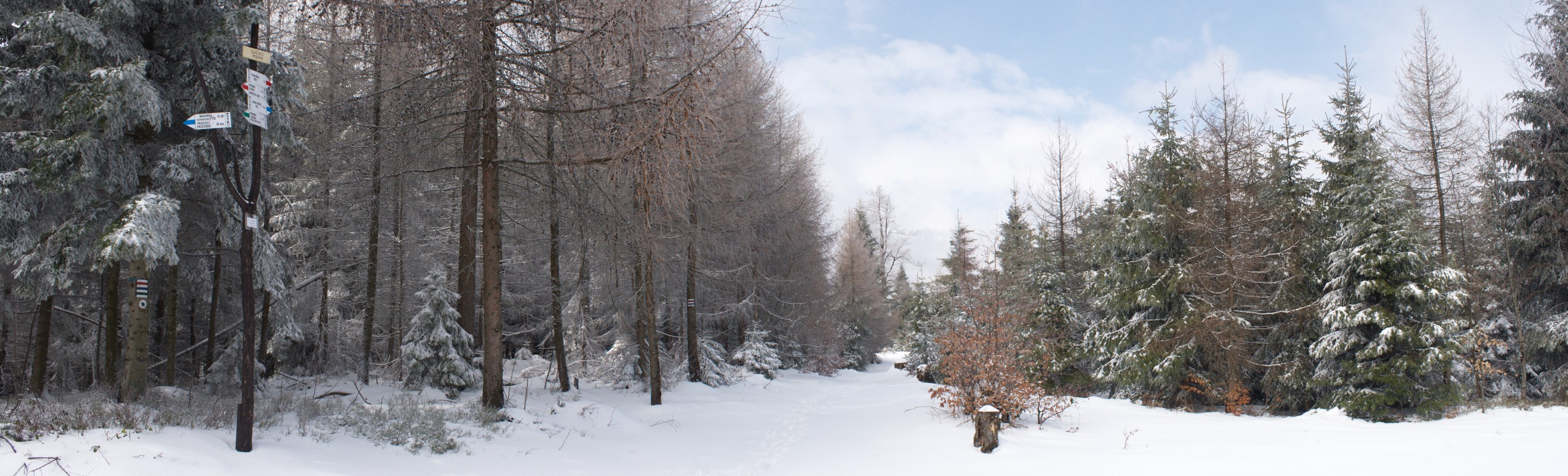 Panorama ze szczytu Gaików - Beskid Mały